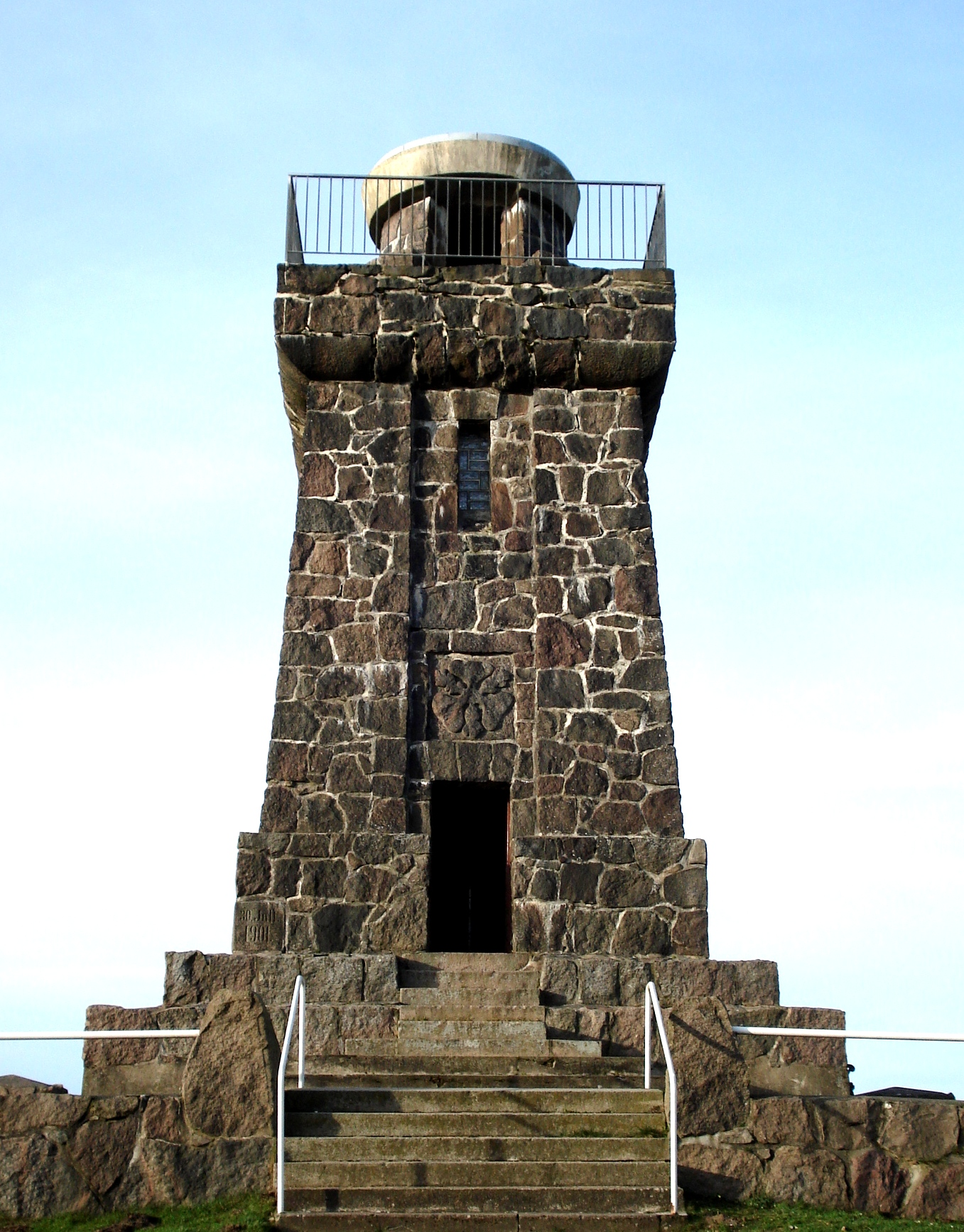 Bismarcksäule auf dem Pariner Berg in Bad Schwartau